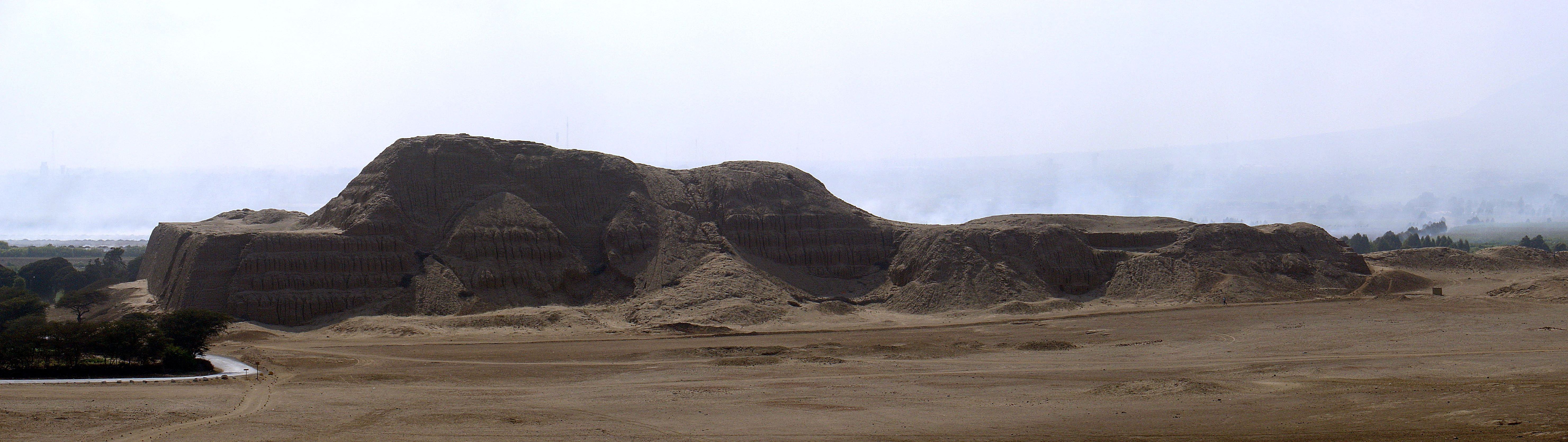 Huaca del Sol, Trujillo, Pérou